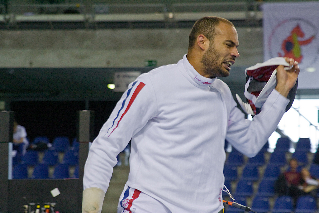 Prise le 7 juillet 2007 aux Championnats d'Europe d'escrime, à Gand (Flandre-Orientale) en Belgique. Fabrice Jeannet, champion olympique et champion d'Europe par équipe